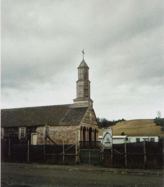 Iglesia en Aldachildo, Isla Lemuy, Provincia de Chiloé, Chile